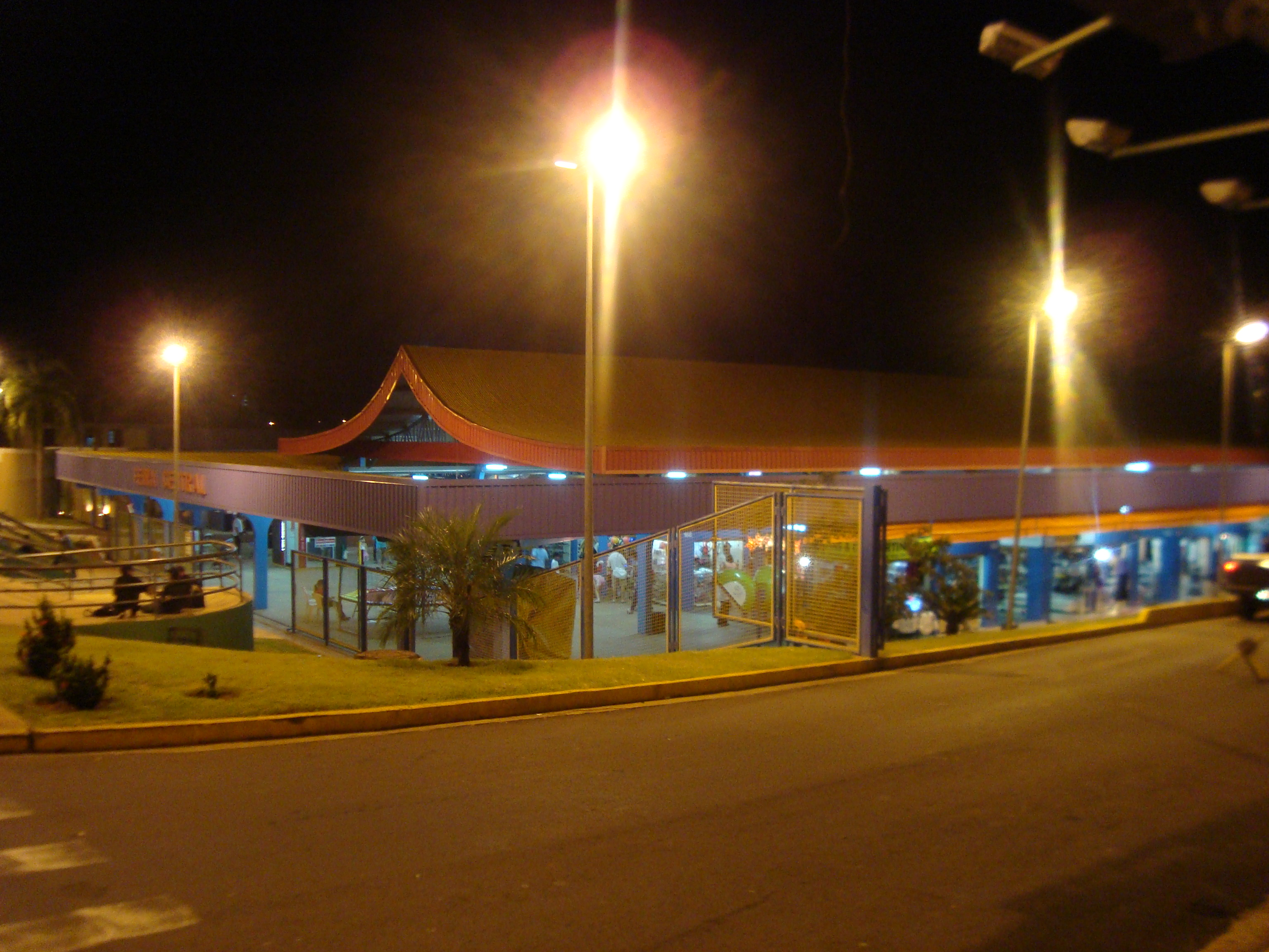 Feira Livre Central, de Campo Grande, Mato Grosso do Sul.